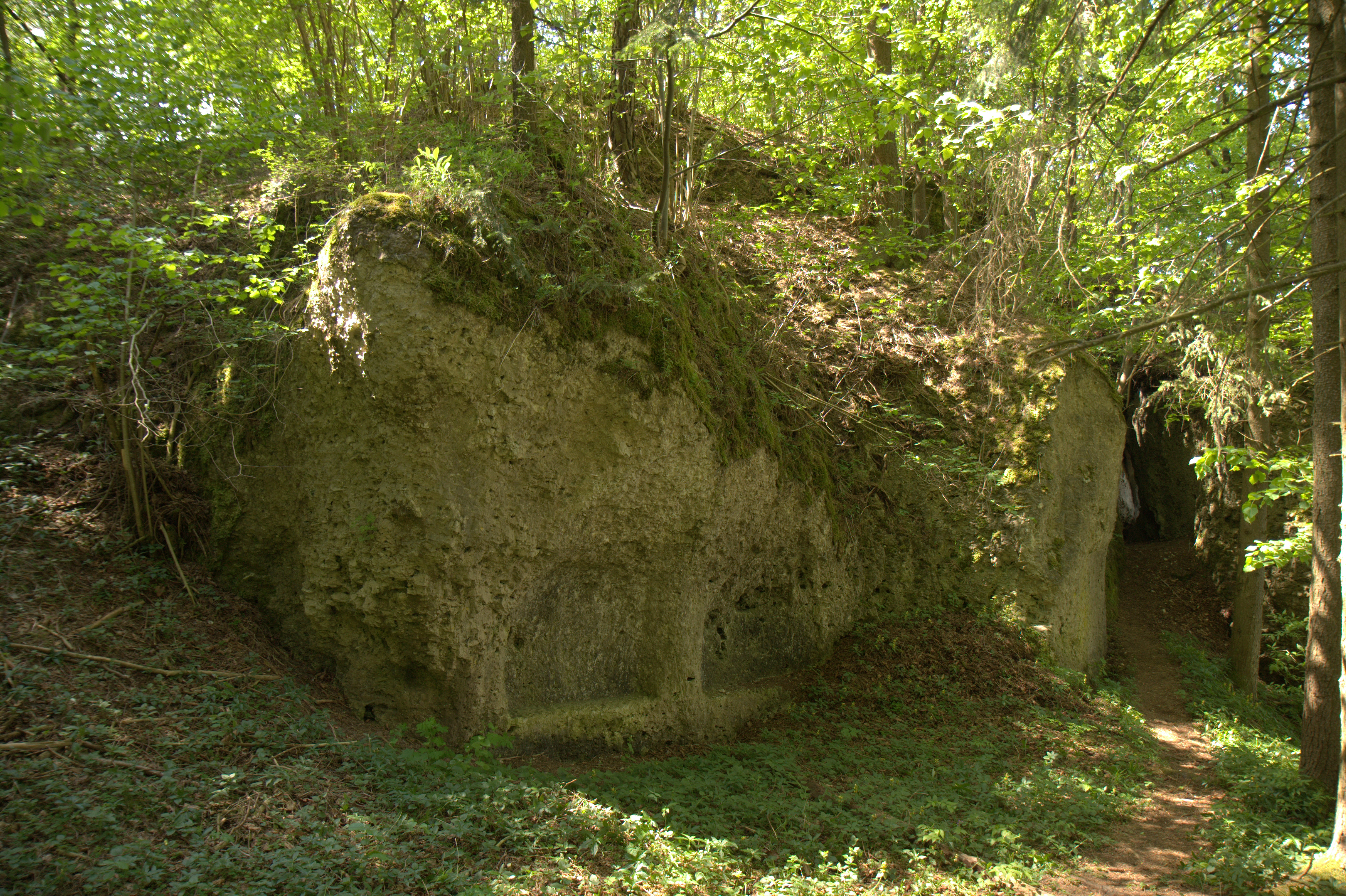 Burgstall Gernotenstein - Ansicht zweier Felsnischen